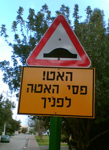 תמרור. צילם דוד שי